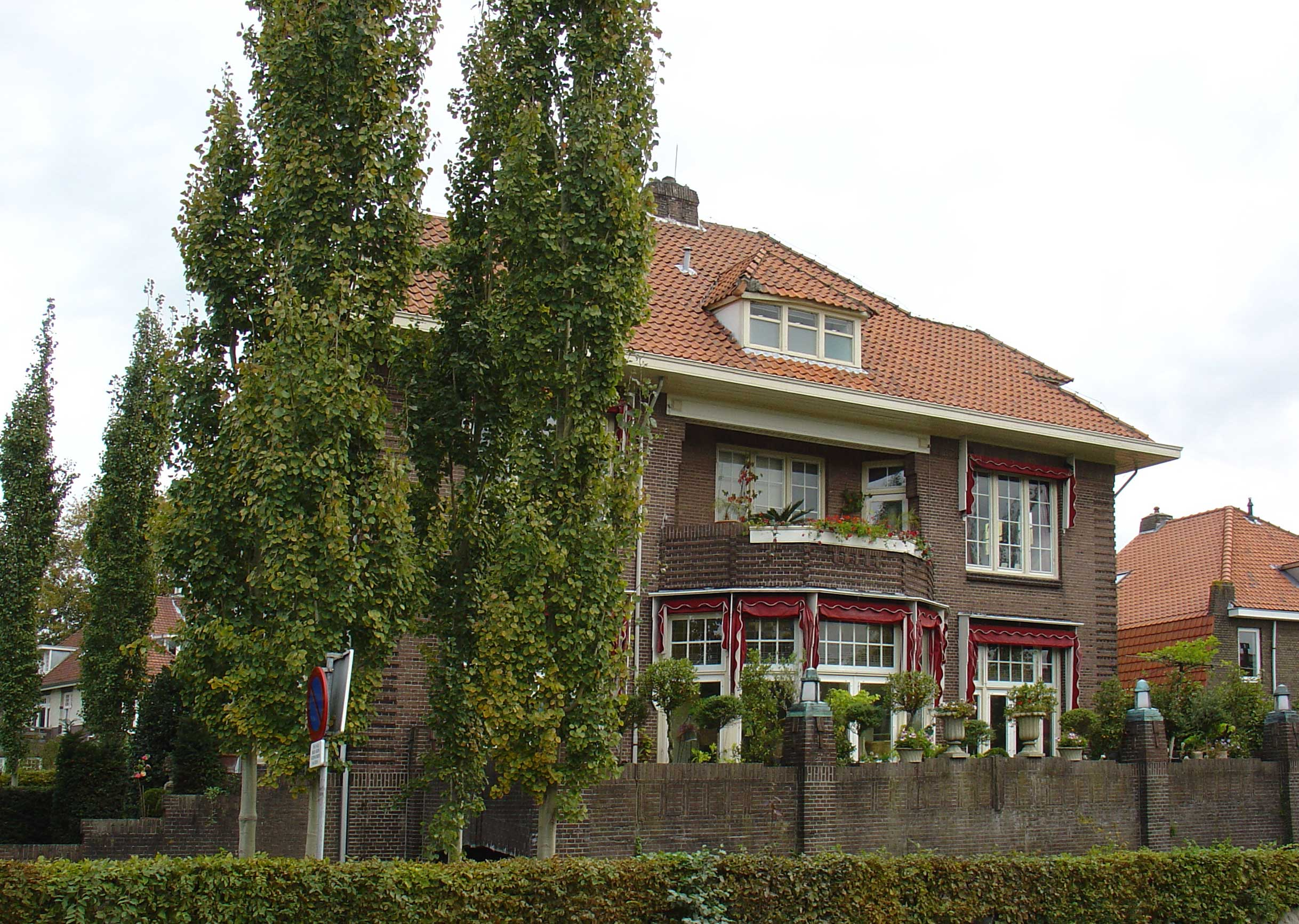 Huize Elisabeth aan de Piersonweg vanaf de Van Strijenstraat gezien, vlakbij het Van Bergen IJzendoornpark.